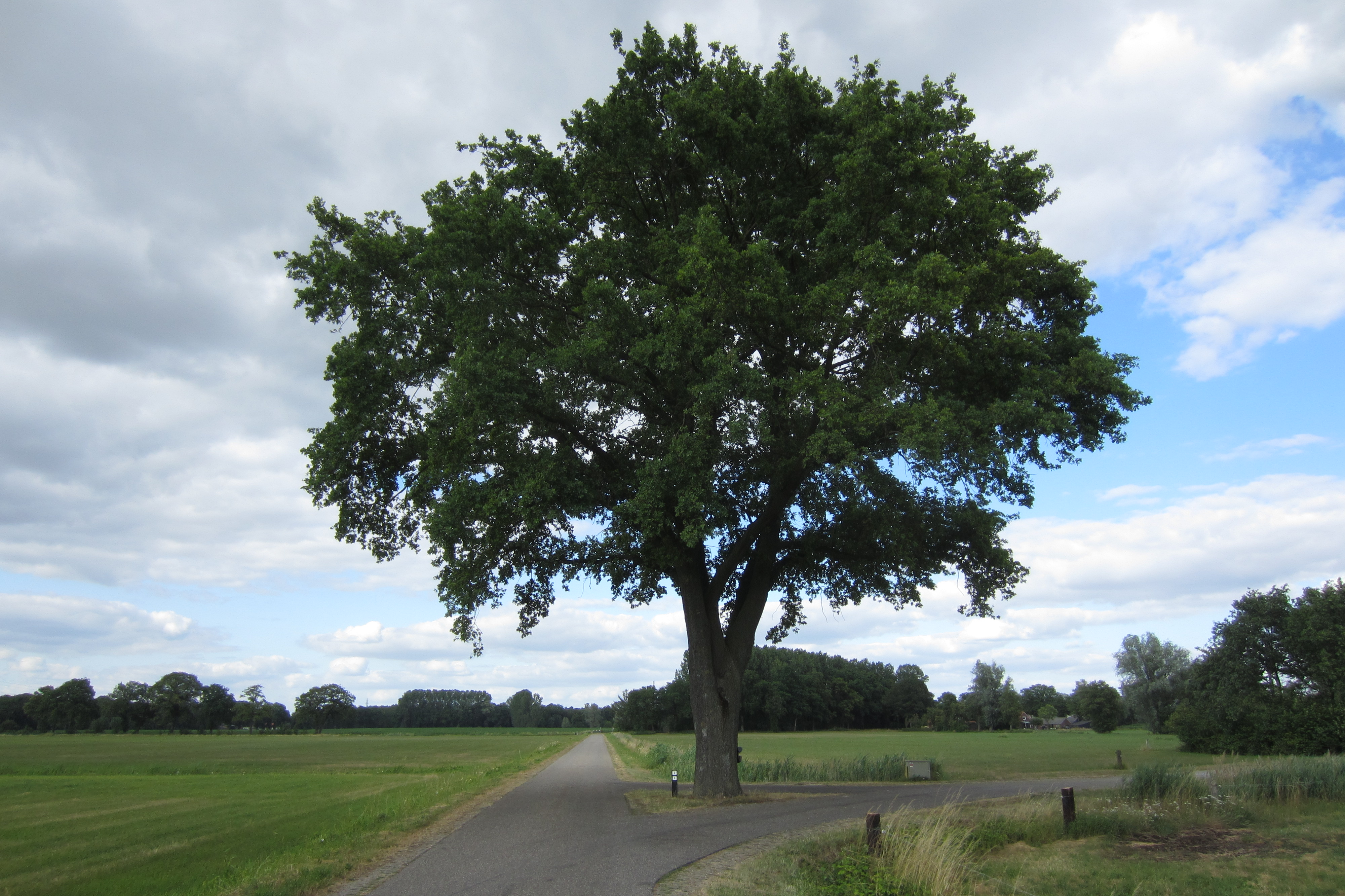 Solitaire eik bij oprit (Boswinkelsweg, Hof van Twente)